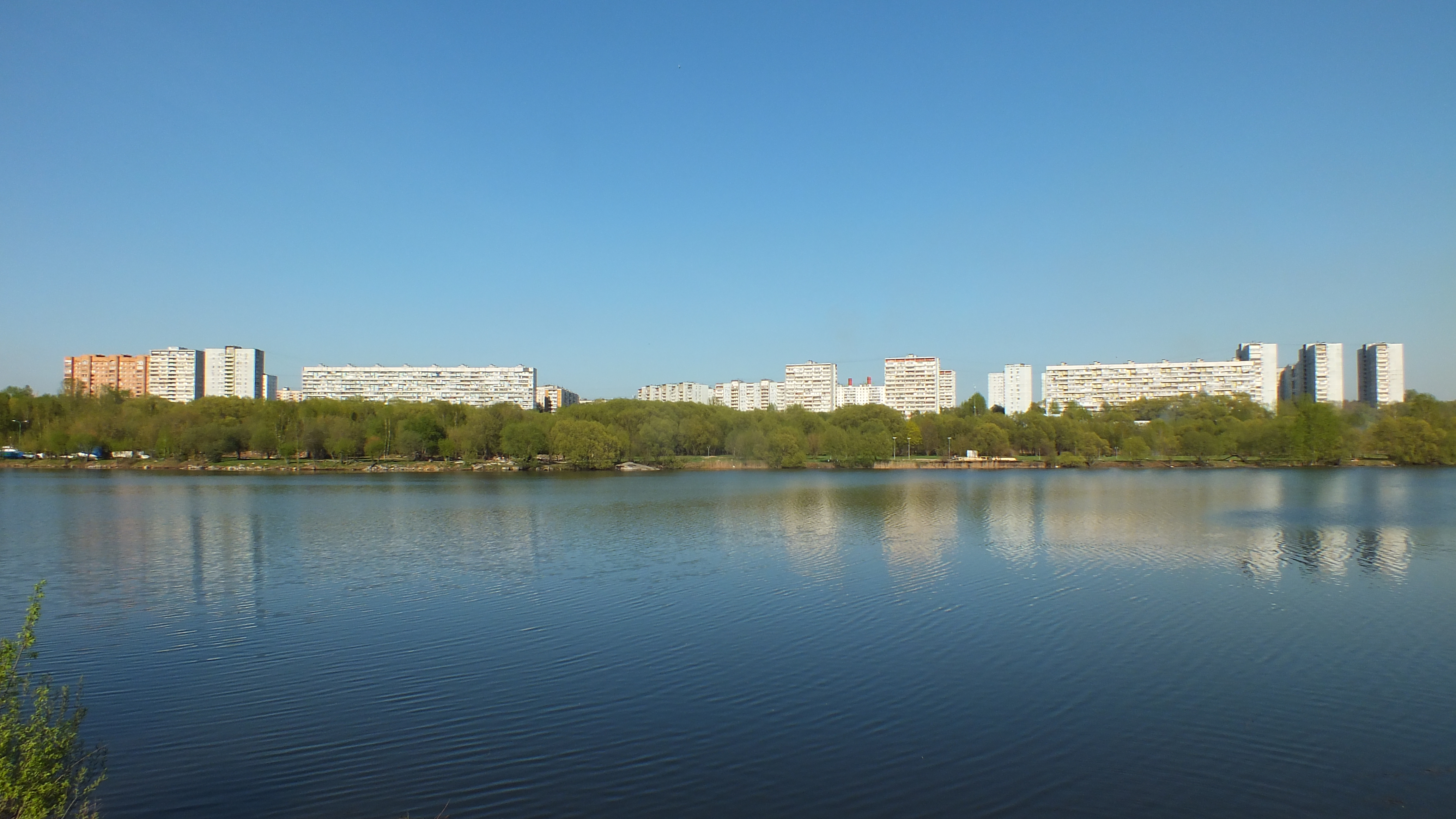 Вид на дома и берег реки Москвы в Капотне: Юго-Восточный округ, Москва. Снято с новой набережной реки Москвы в парке «Братеевская пойма» в районе Братеево 3 мая 2018 года. This image is related to the protected area of Russia number 7710010